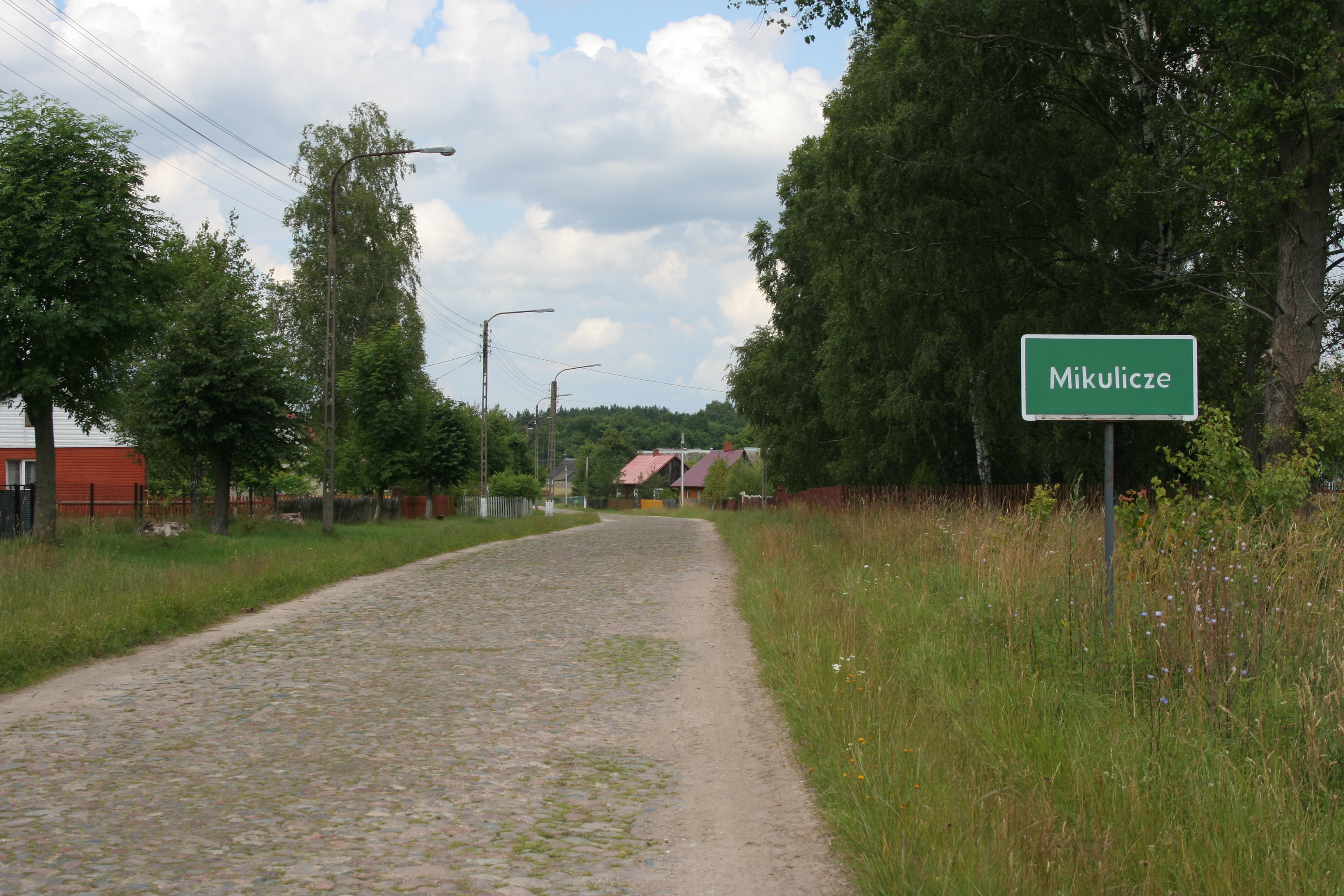 Droga wjazdowa do Mikulicz.